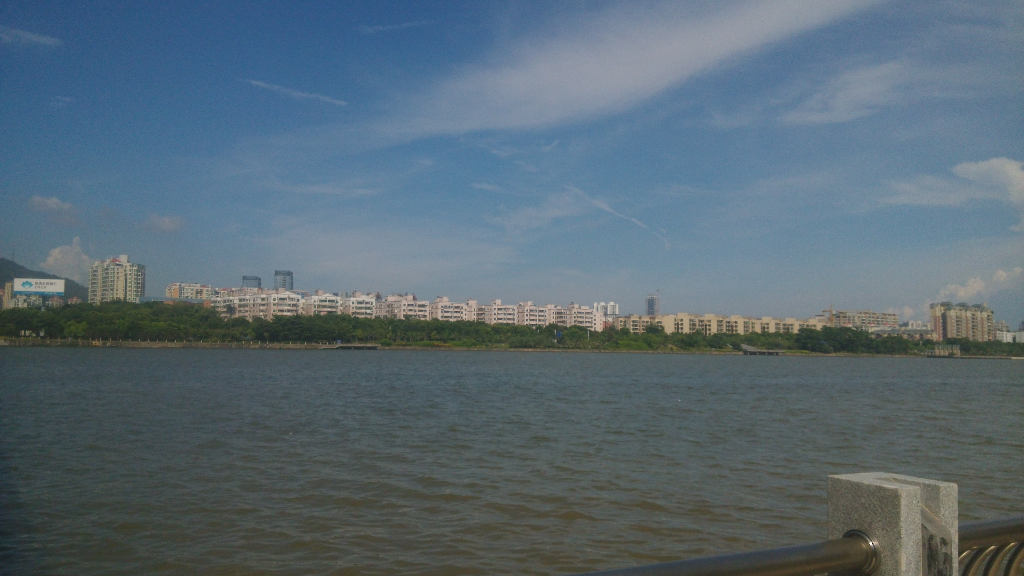 中文（中国大陆）: 我自己的左